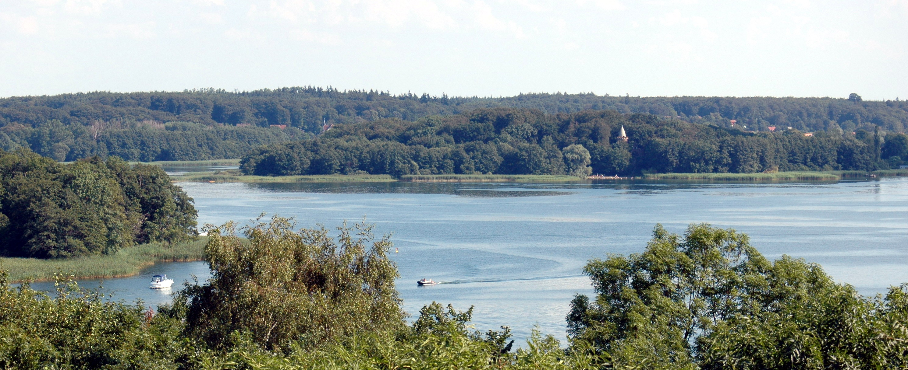 Beschreibung: SO-Bereich des Schweriner Innensee,Aufnahme vom Turm auf der Insel Kaninchenwerder in Richtung Halbinsel Reppin (Mueß), Jahr 2004 Quelle: selbst fotografiert Lizenz